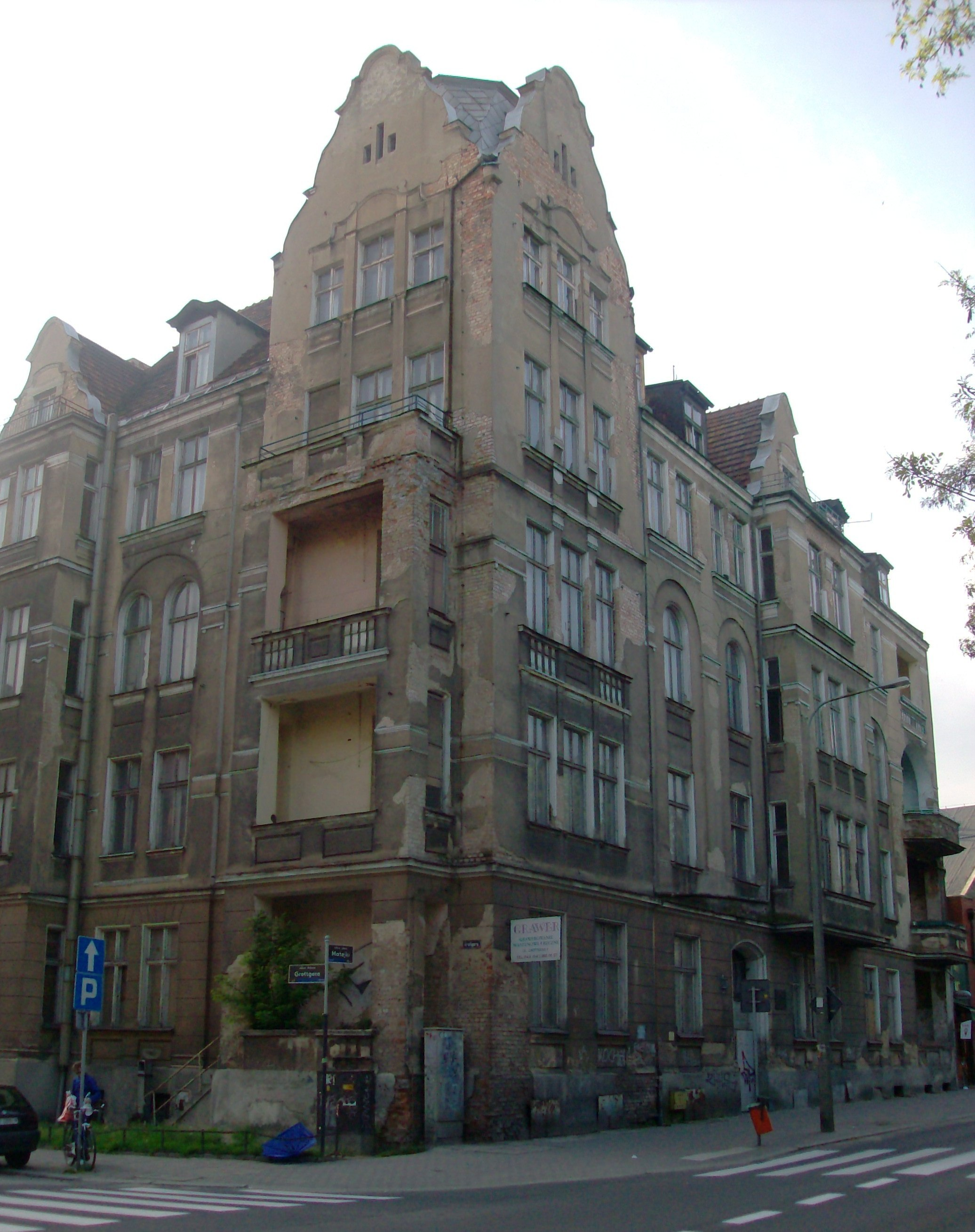 Poznań, ul. Matejki 61 / Grottgera 1 - kamienica, w l. 1945-1949 siedziba Poznańskiego Okręgu Wojskowego (zabytek nr A 382)